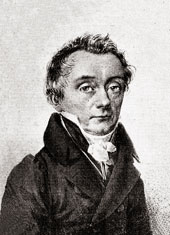 СТАКЕЛЬБЕРГ Густав Оттонович Посланник России в Австрии 1810-1818